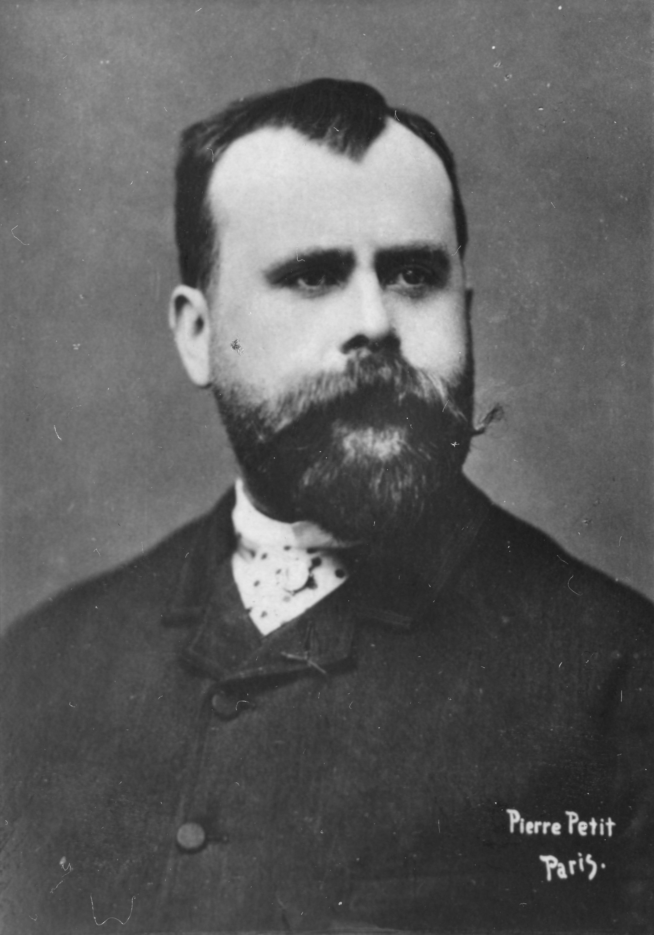 Albert Maignan (1845-1908), peintre français photographié par Pierre Petit, épreuve sur papier albuminé. Photographie de la couverture « Maignan » de la collection Félix Potin. Paris, musée d'Orsay.